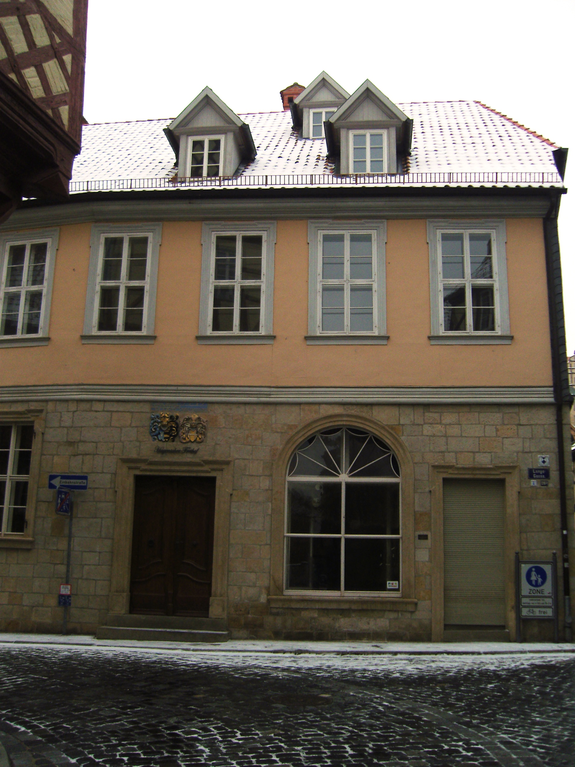 Denkmalgeschützter Vitzthum von Eckstedtscher Freihof in der Langen Gasse 26a in Quedlinburg